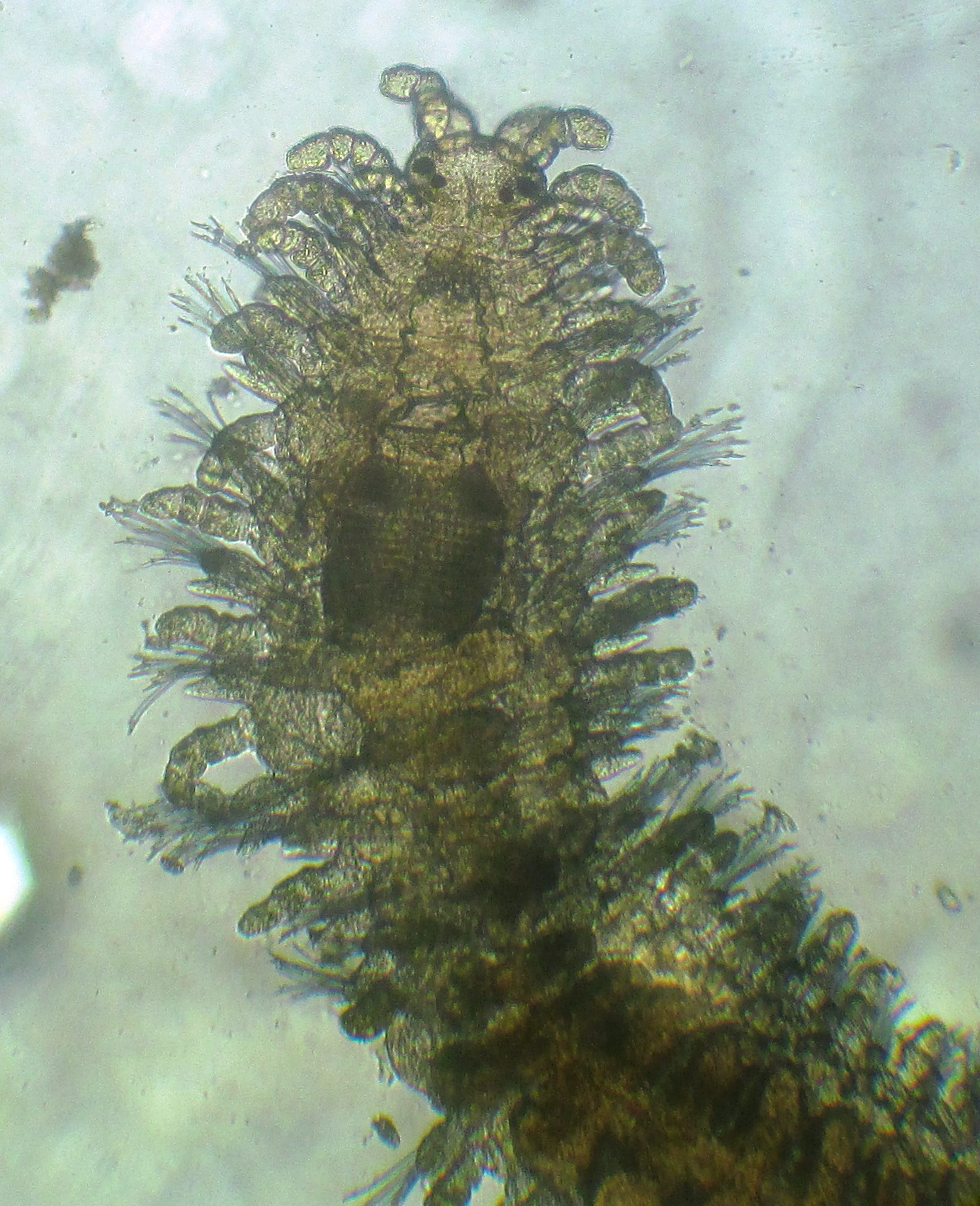 Trypanosyllis coeliaca, Calafuria (LI), mesolitorale